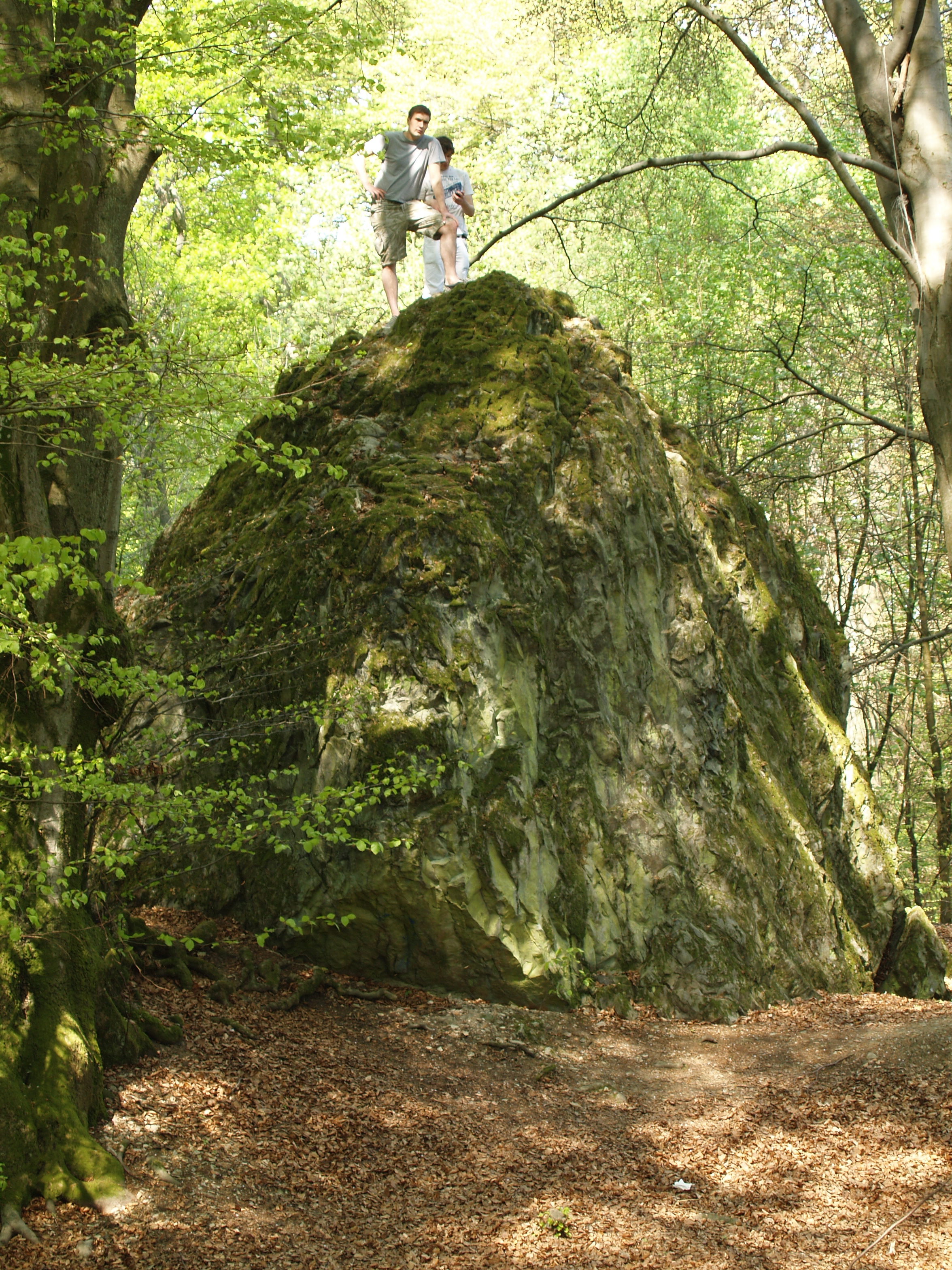 Oberdreiser Beilstein mit Personen zum Größenvergleich